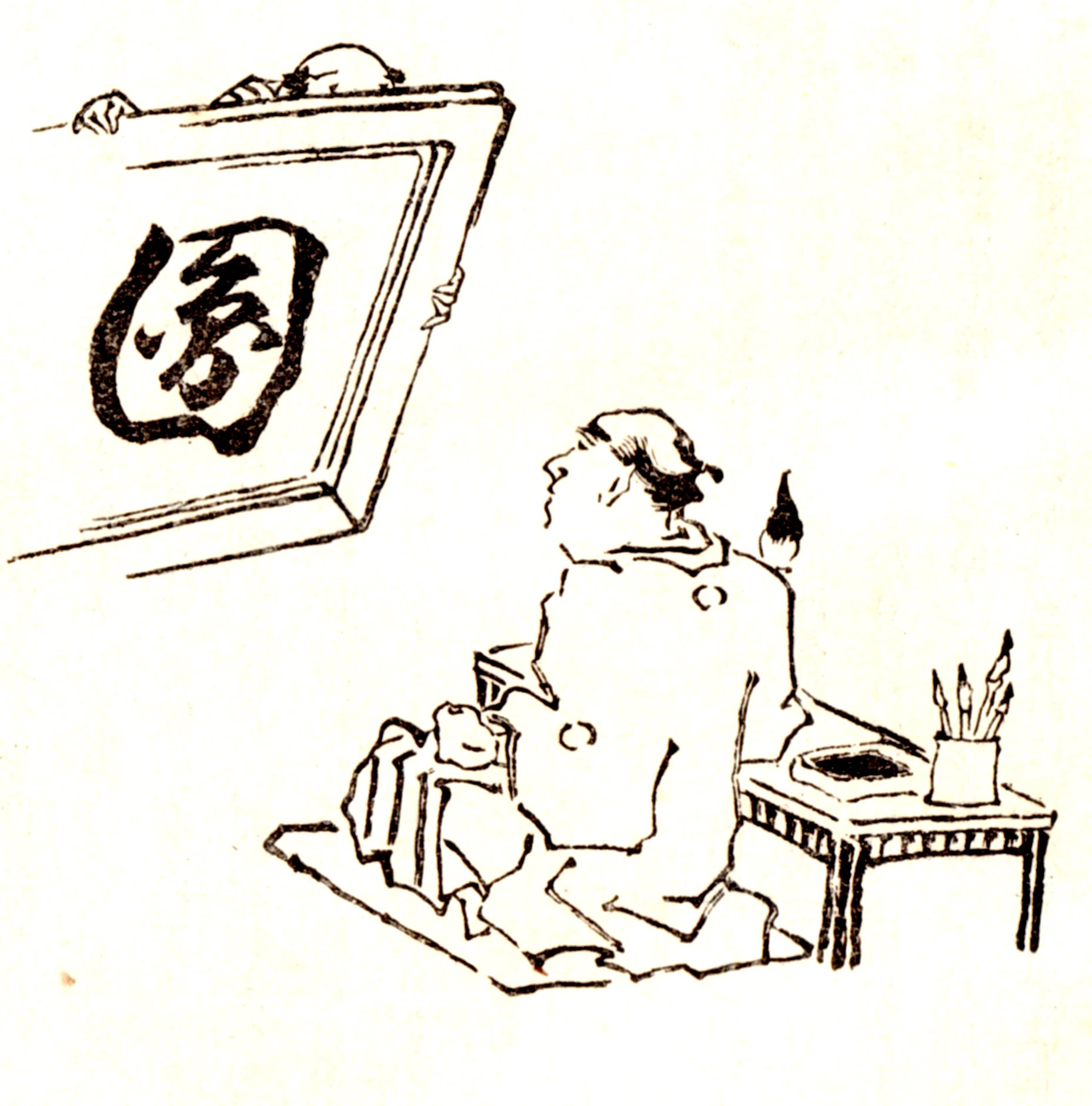 江戸時代の書家・三井親和の肖像。1914年刊『先哲像伝・近世畸人伝・百家琦行伝』（有朋堂書店）による。